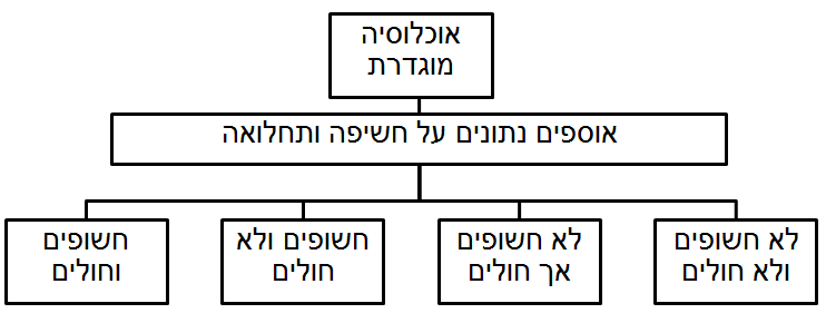 משתתפים במחקר חתך